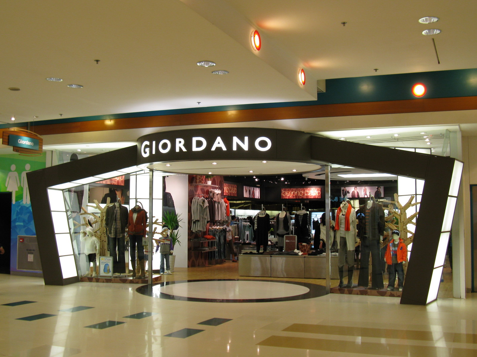 佐丹奴 青衣城分店 Giordano